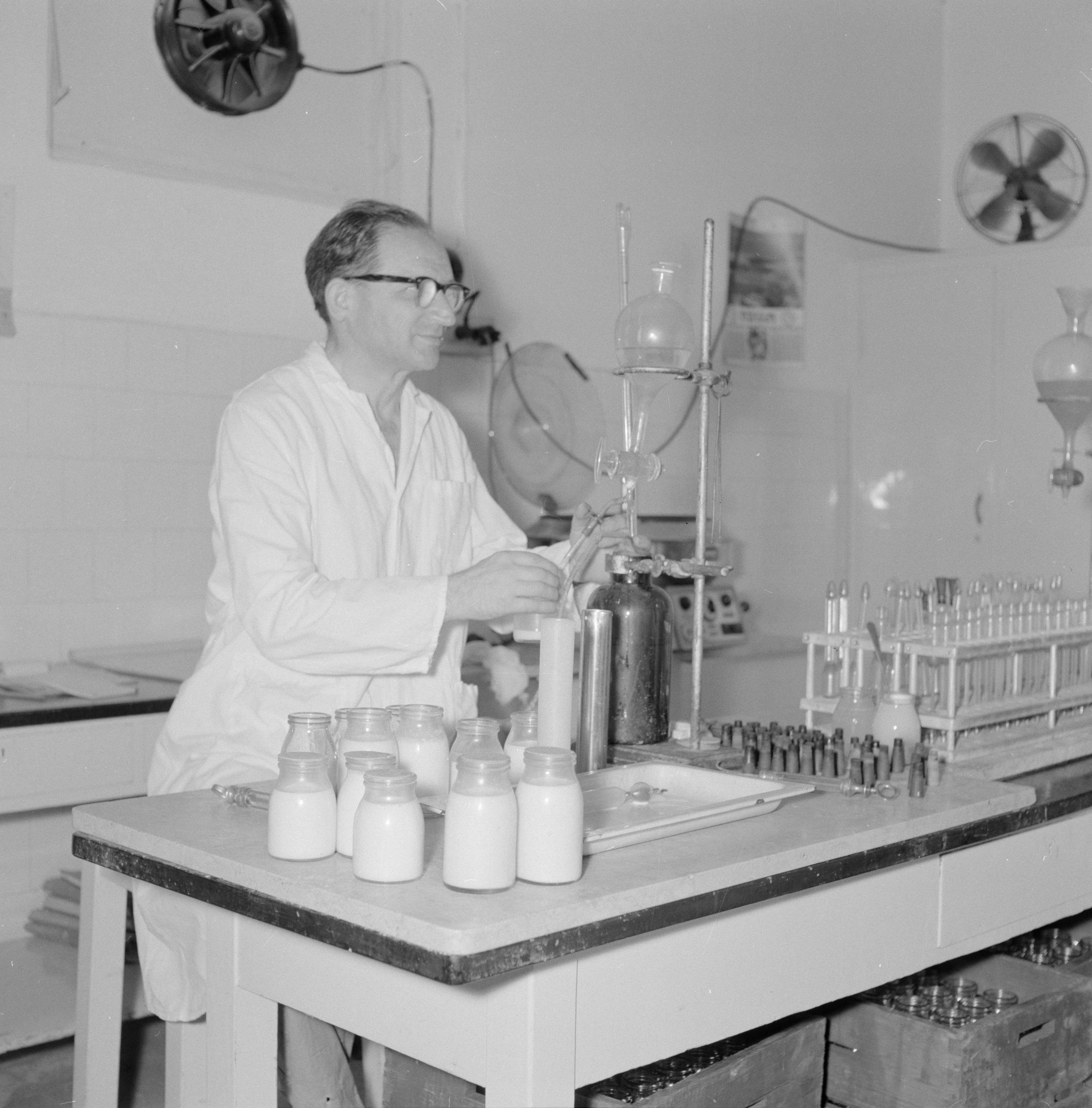 Collectie / Archief : Fotocollectie Van de Poll Reportage / Serie : [ onbekend ] Beschrijving : Zuivelfabriek Tnuva. Laborant aan het werk met monsters Datum : 1 januari 1964 Locatie : Israël Trefwoorden : fabrieken, industrie, laboranten, laboratoria, onderzoek, zuivelproducten Fotograaf : Poll, Willem van de, [onbekend] Auteursrechthebbende : Nationaal Archief Materiaalsoort : Negatief (zwart/wit) Nummer archiefinventaris : bekijk toegang 2.24.14.02 Bestanddeelnummer : 255-4440